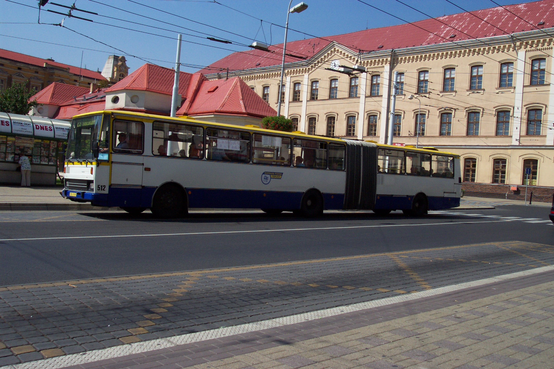 Teplice, Czech republic, bus type Karosa at Benešovo náměstí - autobus typu Karosa v Teplicích na Benešově náměstí